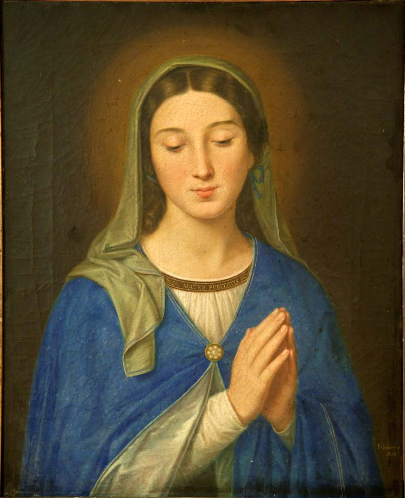 Quadro di mia proprietà